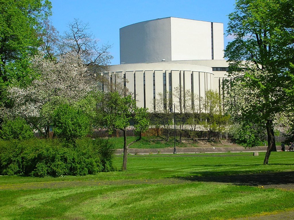 Opera widziana z Wyspy Młyńskiej w Bydgoszczy